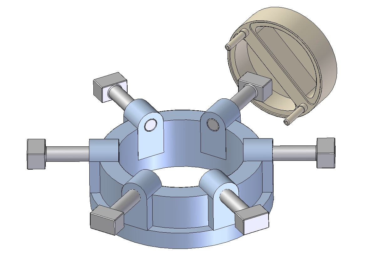 Flyerwickeltechnik 1